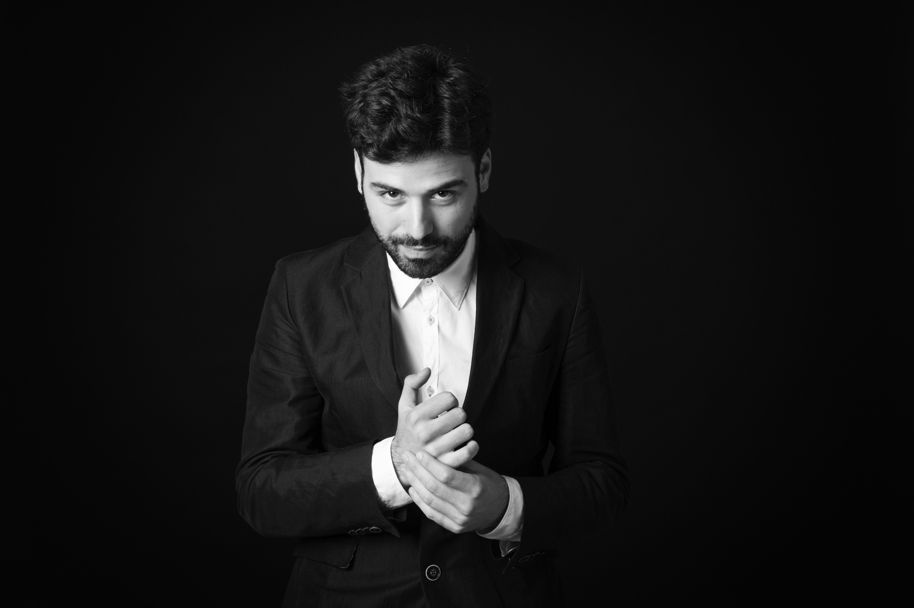 Luca Sannino - 2014